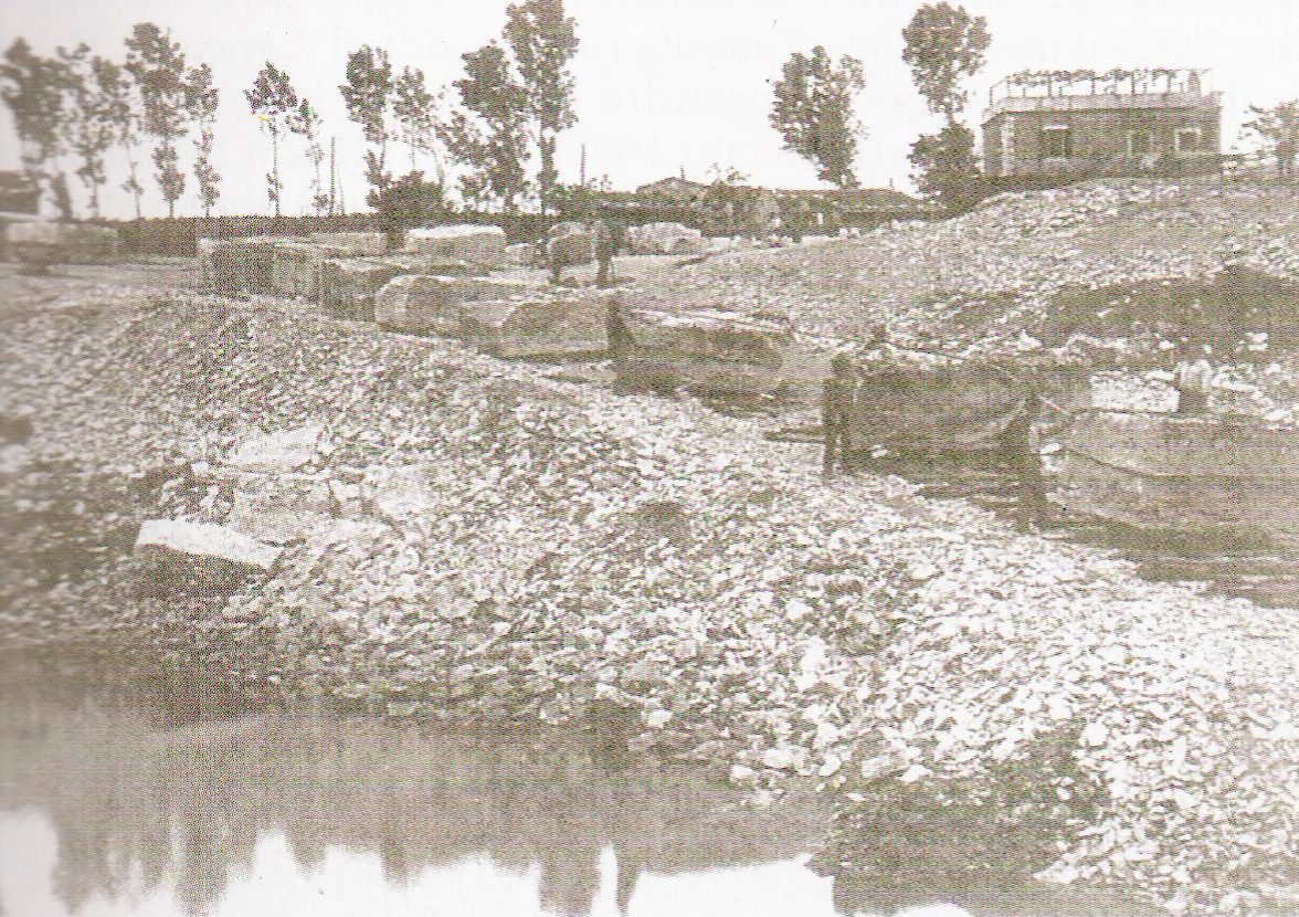 Blocchi di travertino avviati verso l'Aniene (fine '800). Archivio Gino Mezzetti (Tivoli).